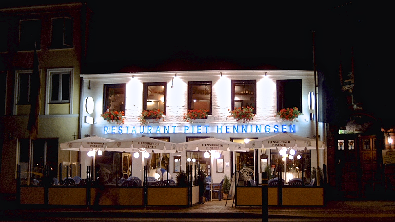 Restaurant Piet Henningsen im Flensburger Hafenvirtel